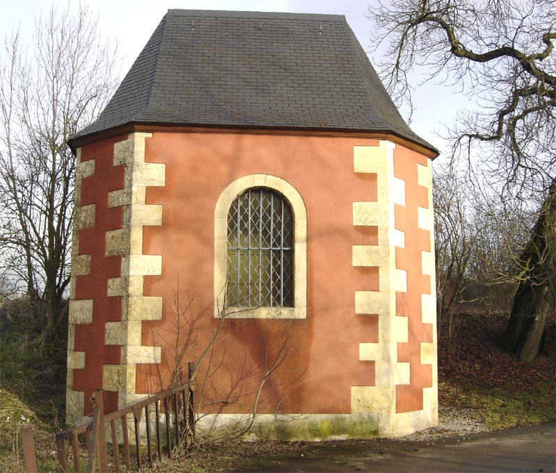 Suessemer Weekappell